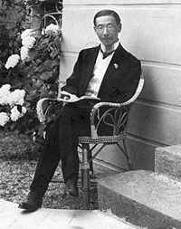 Fotografía del político chino Lu Tseng-Tsiang tomada en 1922.